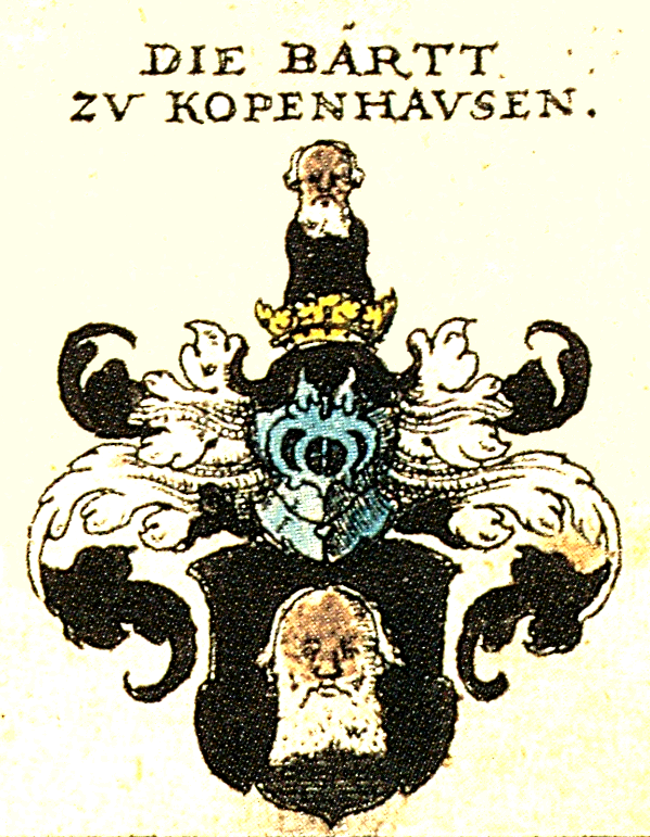 Wappen des Bayerischen Adelsgeschlechts (Münchner Patriziergeschlechts) der Barth (zu Harmating resp. zu Kopenhausen) (Siebmacher 1605:90,3)